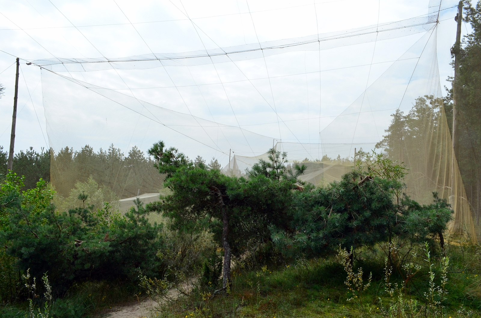 Vogelwarte Rossitten: Vogelfangnetze der Feldstation „Fringilla“.